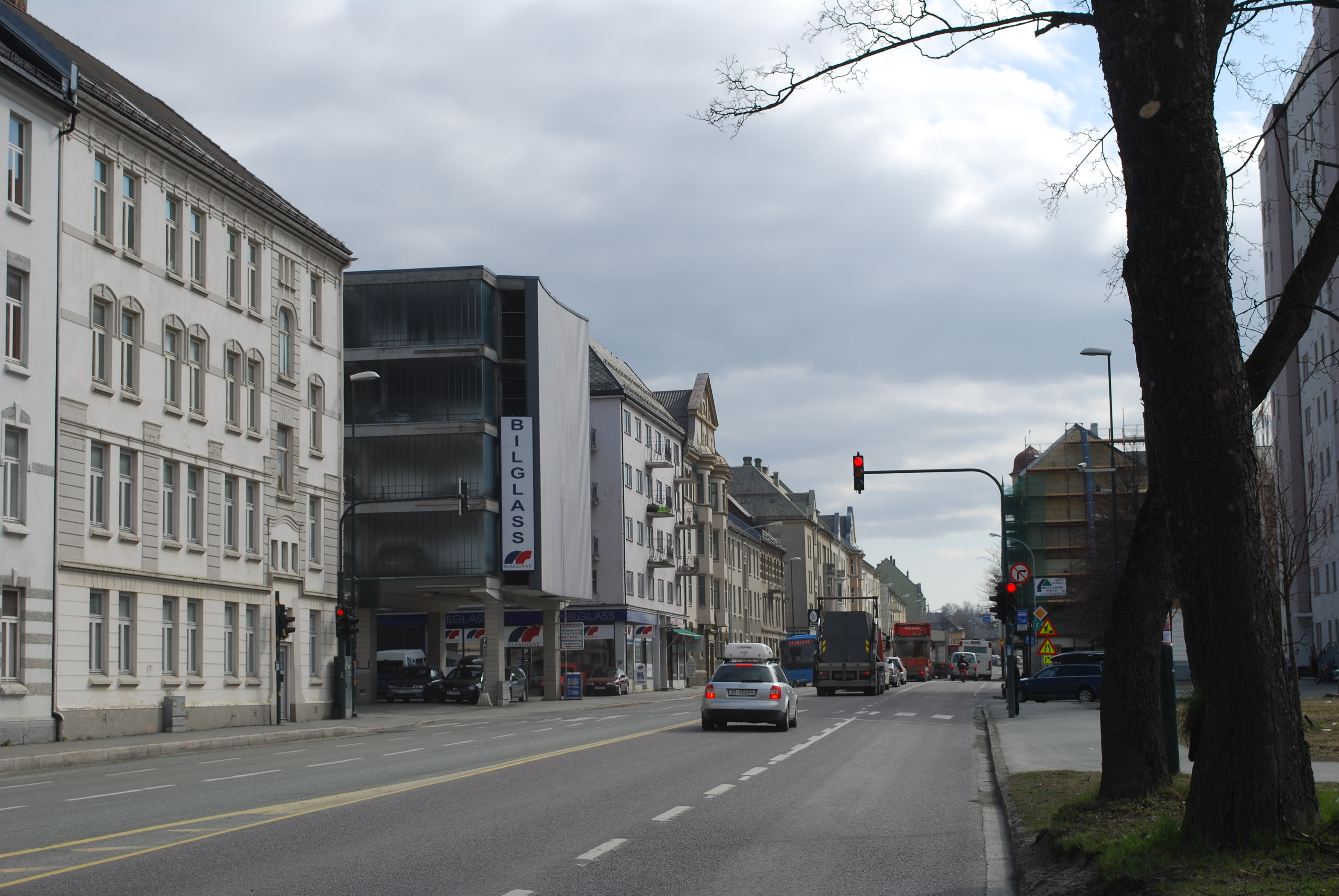 Elgeseter gate i Trondheim, sett sørover ved nr. 19 og 21 til venstre i bildet.